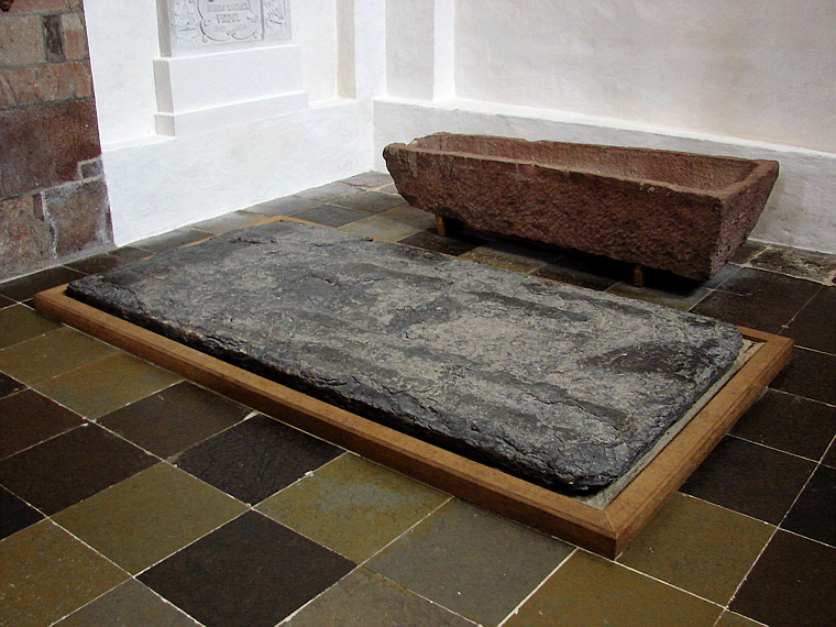 Christoffer Is sandstenssarkofag og gravsten i sort, belgisk marmor, optaget fra kongens grav ved højalteret i Ribe Domkirke, Jylland